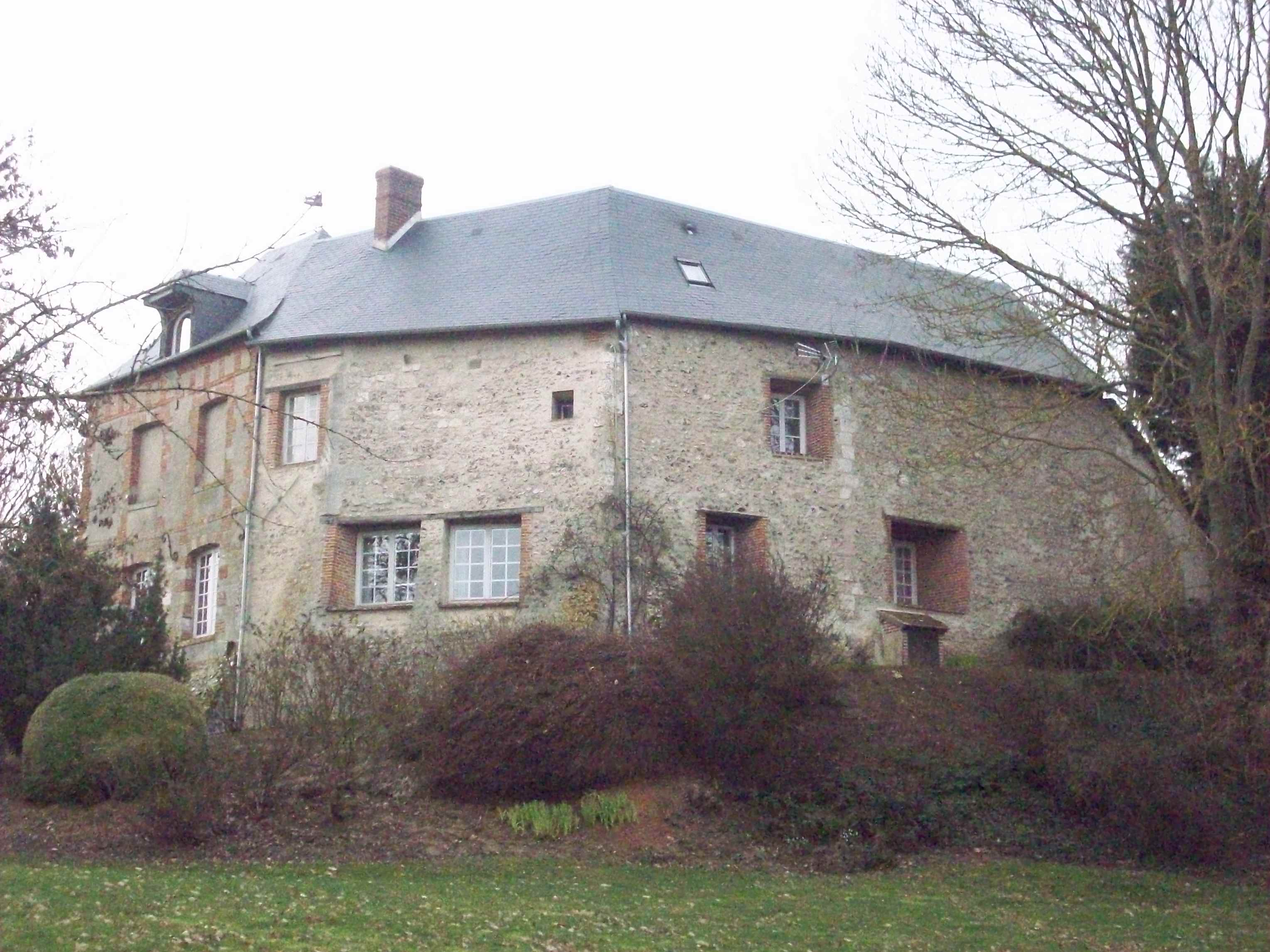 Ancien château de type donjon-chemise sur motte, qui daterait du début du XIe siècle, faisant face à l'église.